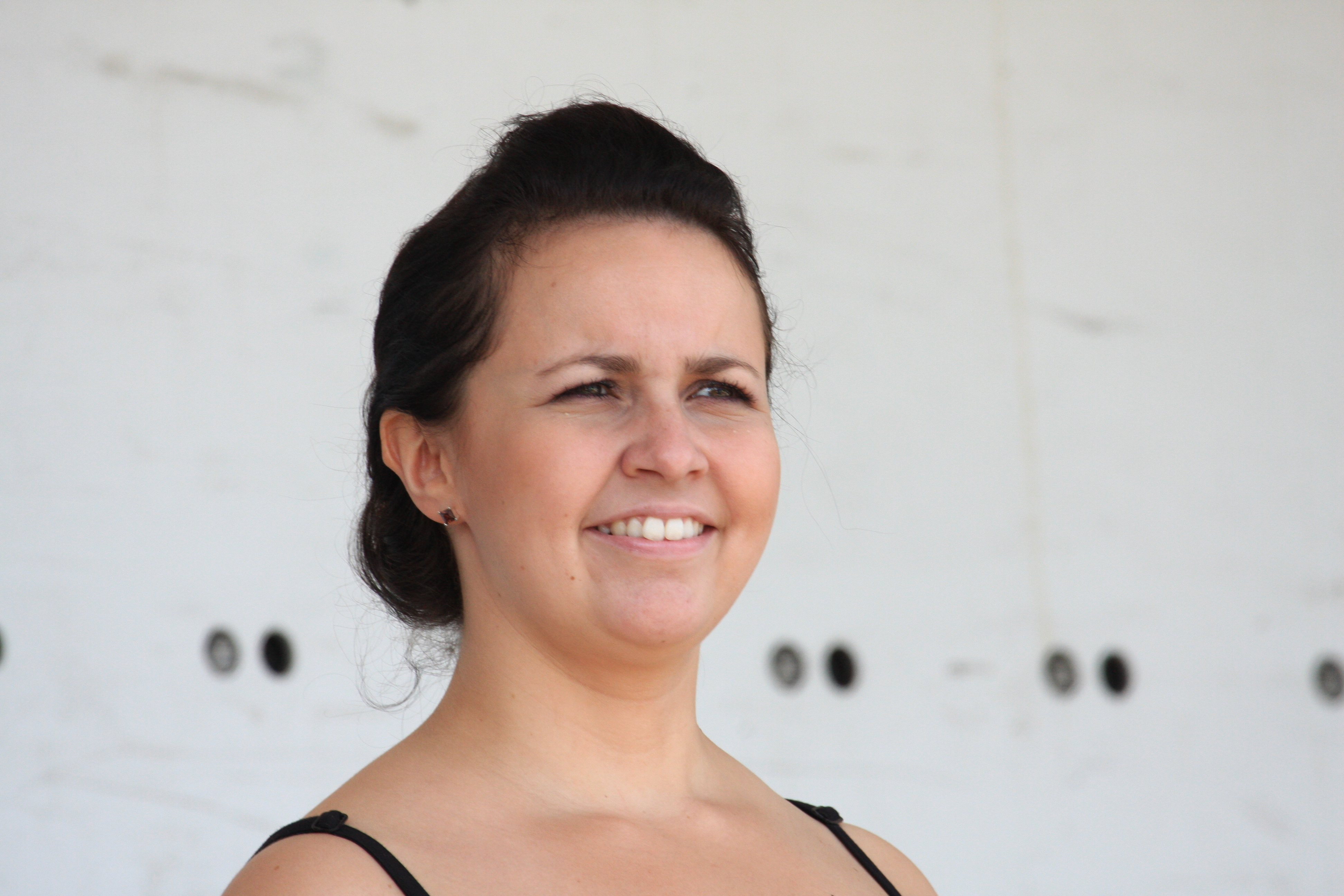 Johanna Debreczeni suomalainen laulaja